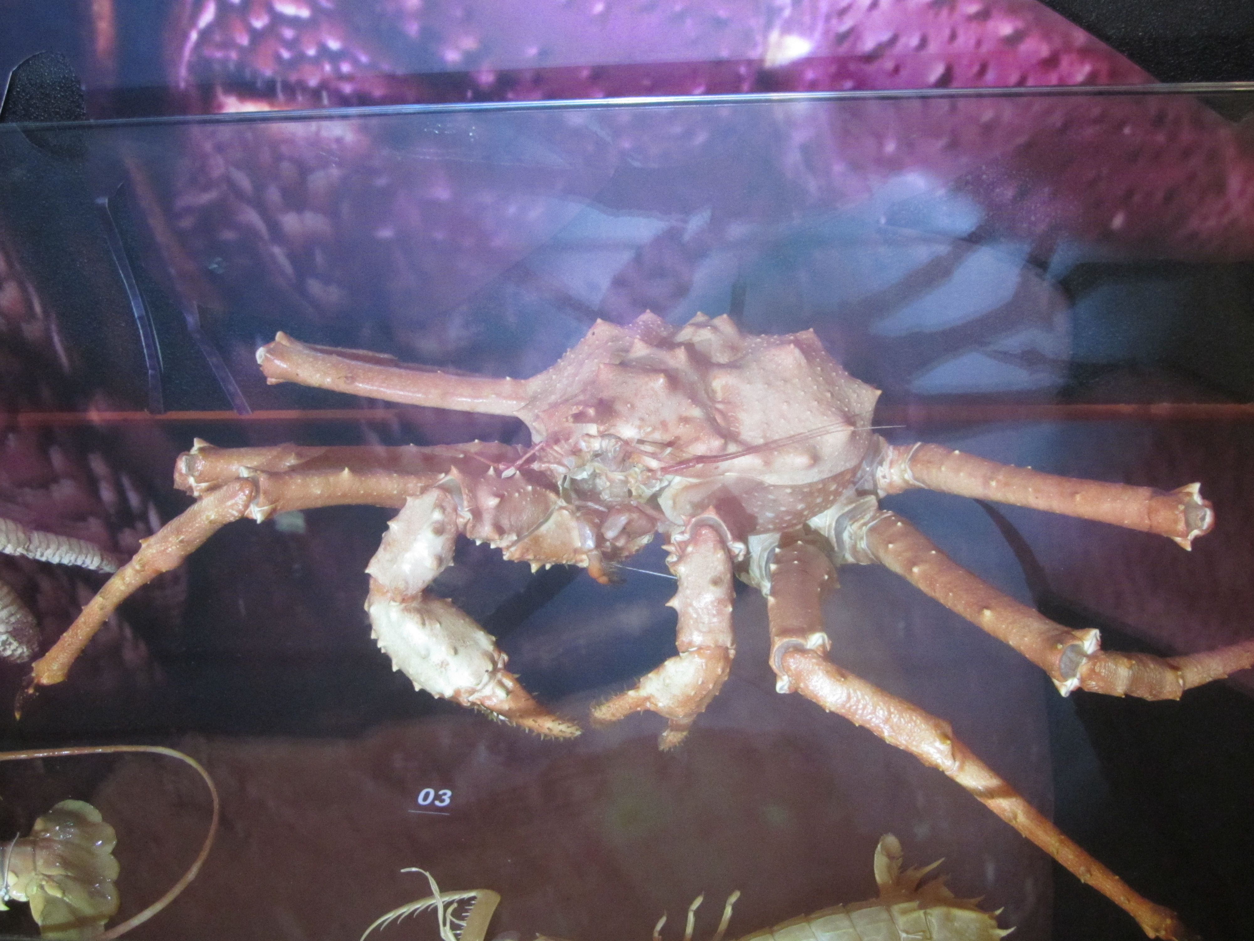 塔形石蟹標本